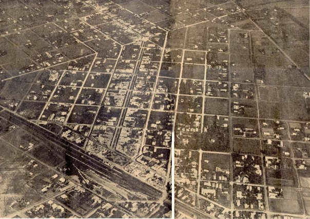 Vista aérea de Merlo, primera mitad del siglo 20